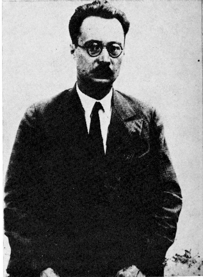 Srpskohrvatski / српскохрватски: Đuro Cvijić